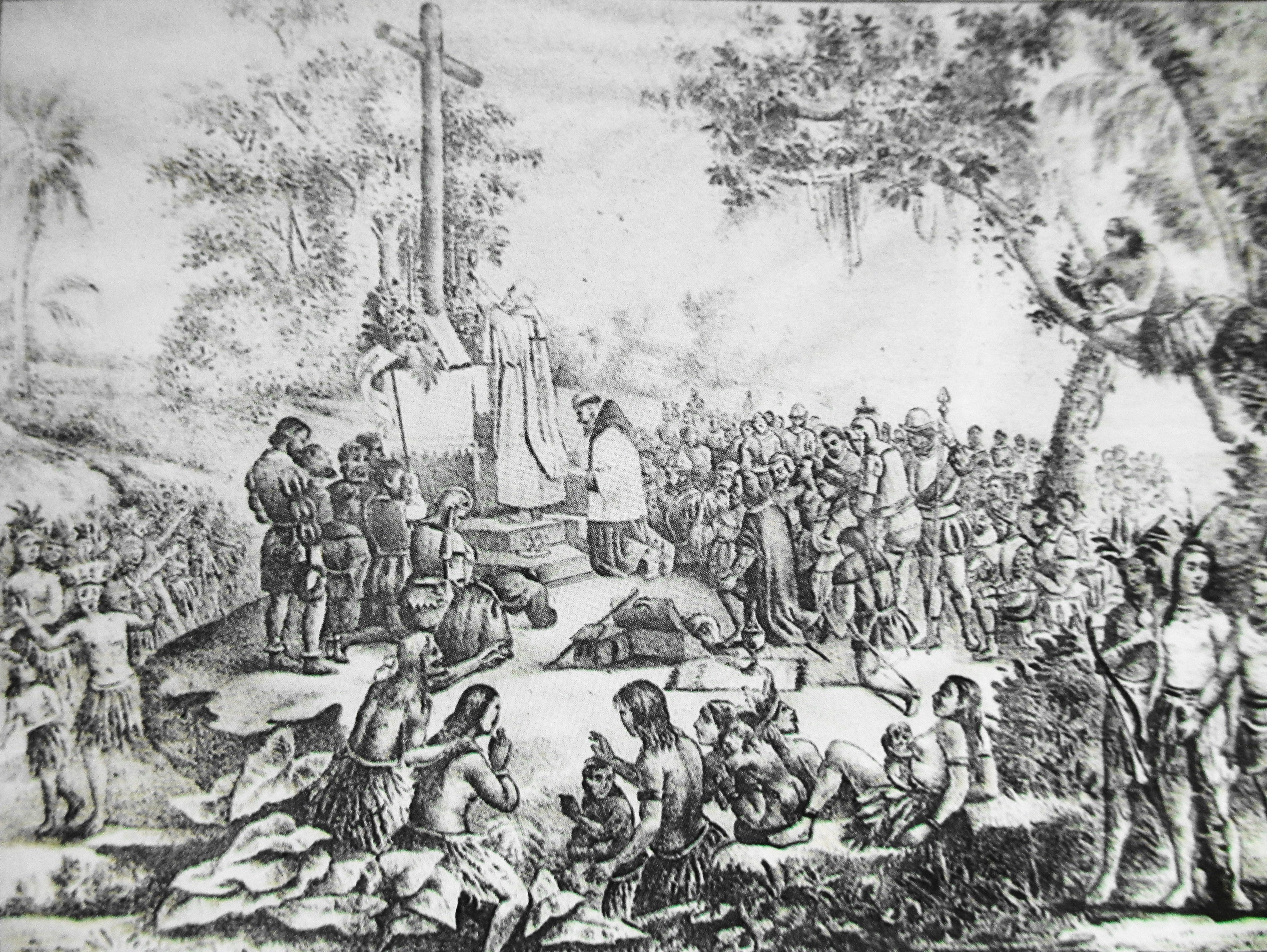 Celebración de la que fue la primera misa cristiana en territorio continental de México, llevada a cabo en la población maya de Potonchán, hoy municipio de Centla, Tabasco el 17 de abril de 1519 durante el viaje de Hernán Cortés. Oficiada por Fray Bartolomé de Olmedo y el clérigo Juan Díaz., y en donde se bautizaron 20 indígenas entre ellas la célebre Malintzin a la que se la puso por nombre Marina.